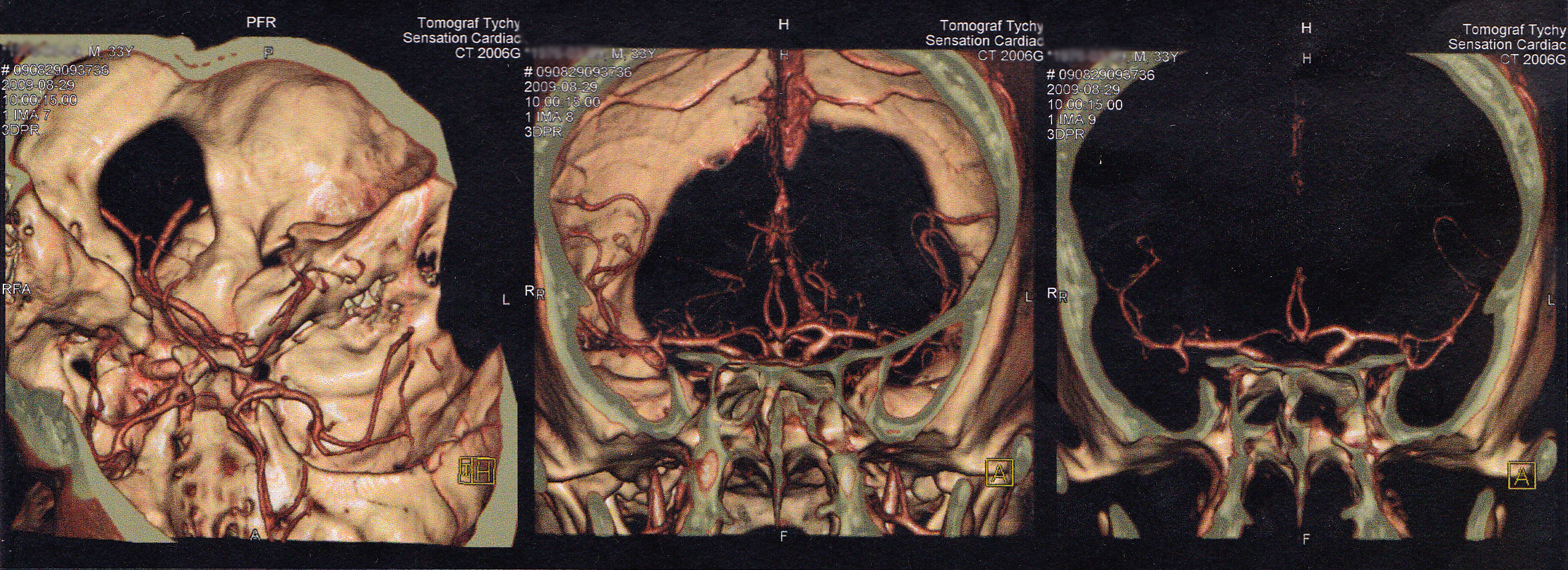 Tomografia komputerowa głowy wykonana za dorosłym i zdrowym mężczyźnie.